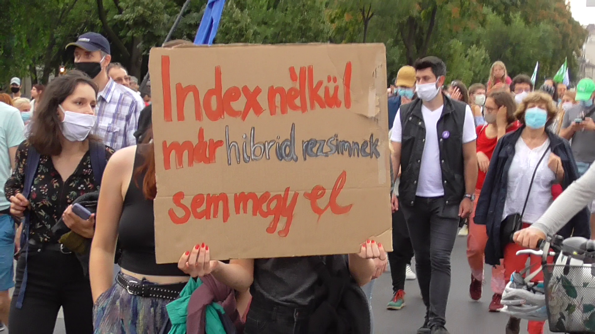 Index.hu tüntetés 2020. július 24. – No Hibrid Regime